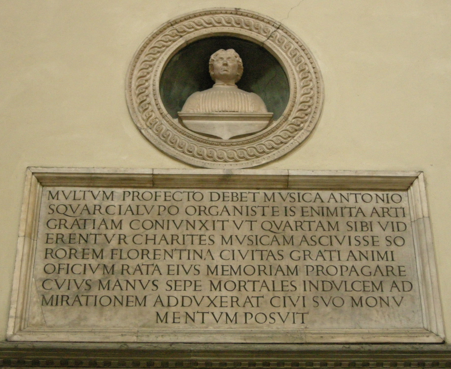 Chiesa di Santa Maria del Fiore a Firenze. Tondo ottocentesco, opera di Ulisse Cambi, con busto di Antonio Squarcialupi, opera di Benedetto da Maiano. L'epigrafe latina è di Agnolo Poliziano.